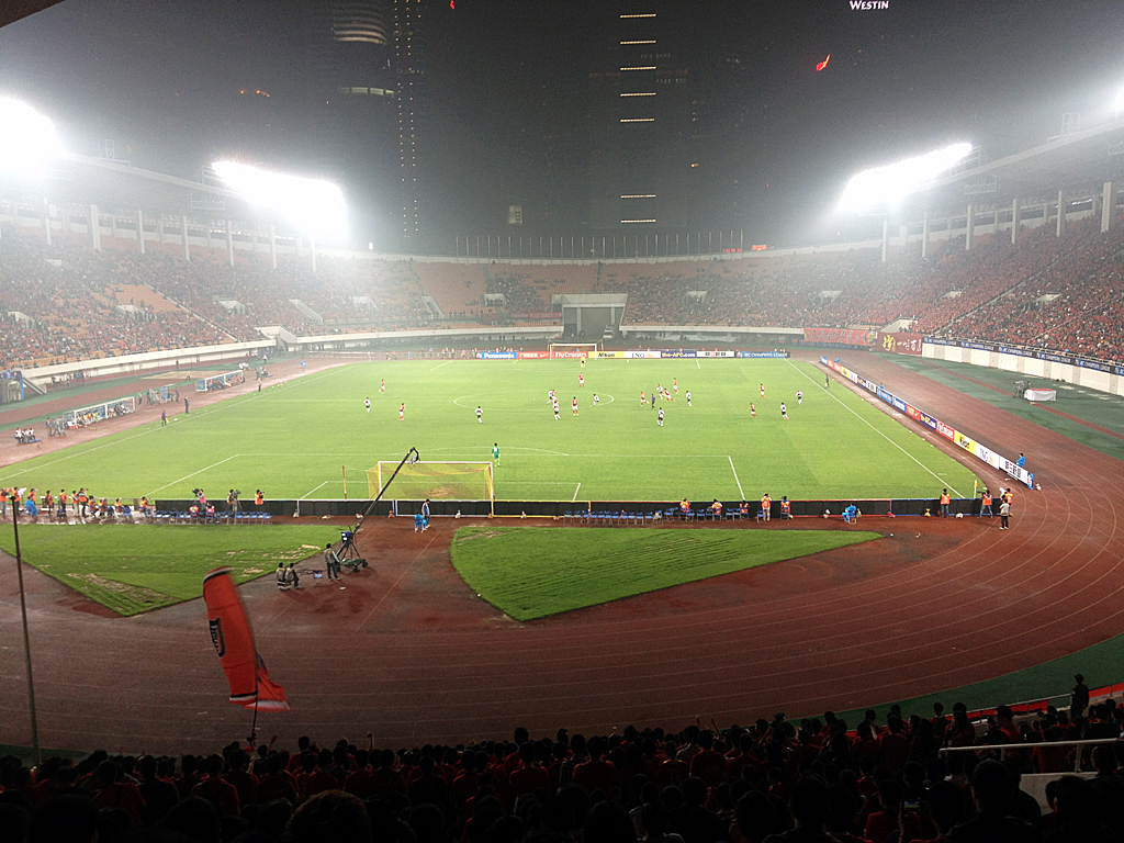 2013年4月3日，天河体育场，亚洲冠军联赛，广州恒大-蒙通联。